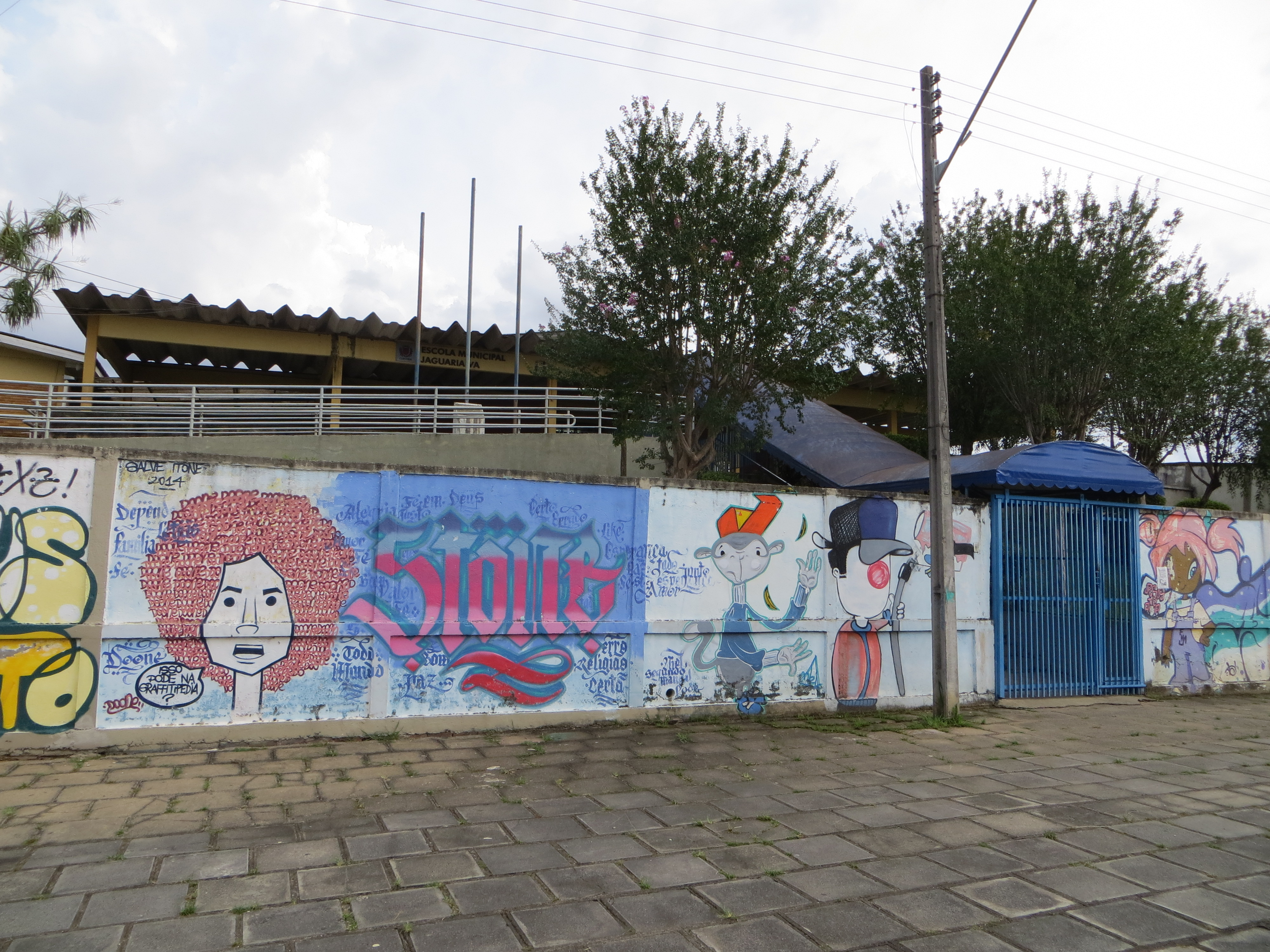 Escola Municipal Jaguariaíva, no bairro do Bacacheri, em Curitiba, capital do estado brasileiro do Paraná.